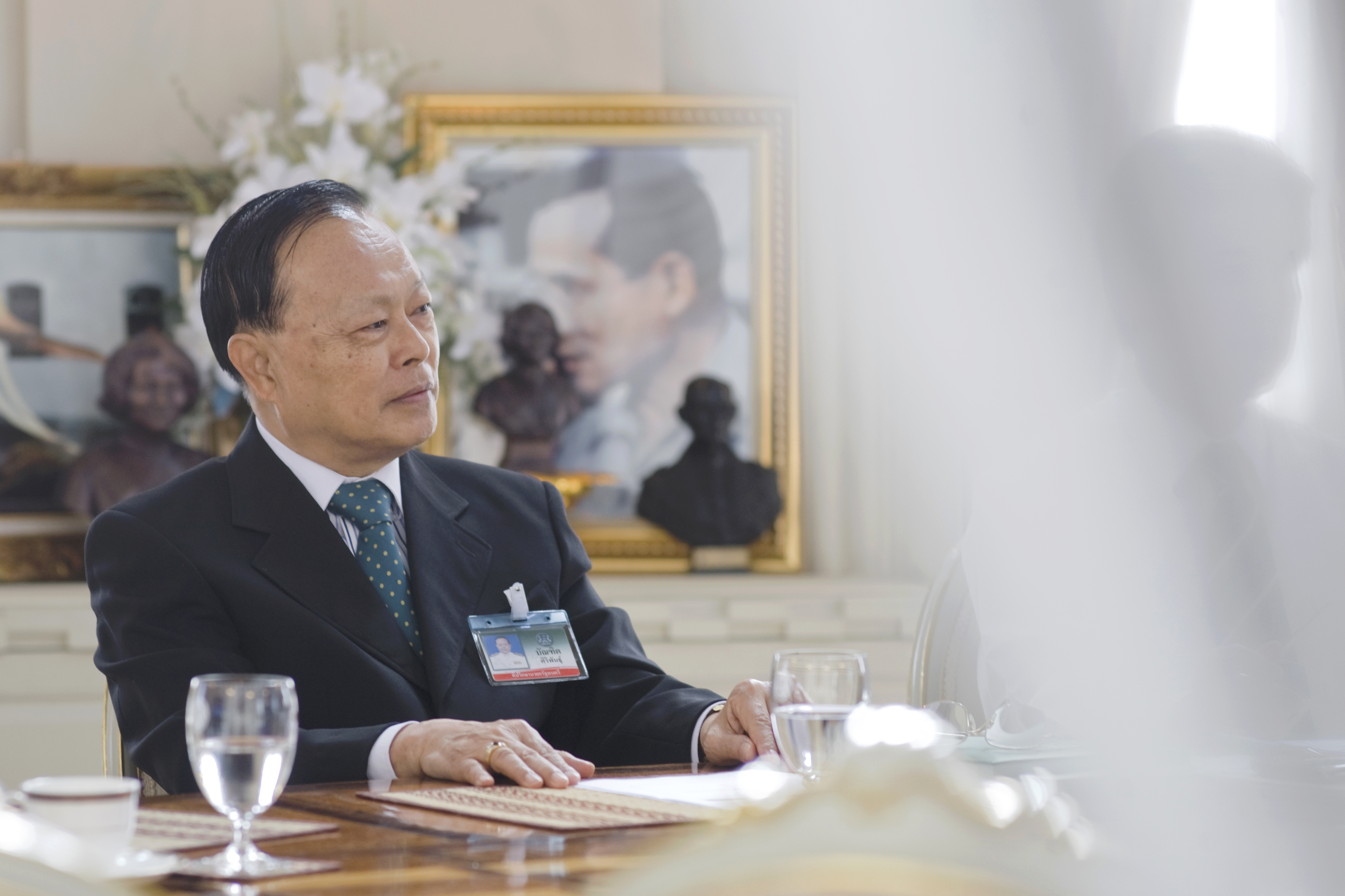 นายกรัฐมนตรีรับประทานอาหารเช้าร่วมกับที่ปรึกษานายกรัฐมนตรี ณ ห้องนายกรัฐมนตรี ตึกไทยคู่ฟ้า ทำเนียบรัฐบาล วันที่ 25 มิถุนายน 2553 (The Official Site of The Prime Minister of Thailand Photo by พีรพัฒน์ วิมลรังครัตน์)